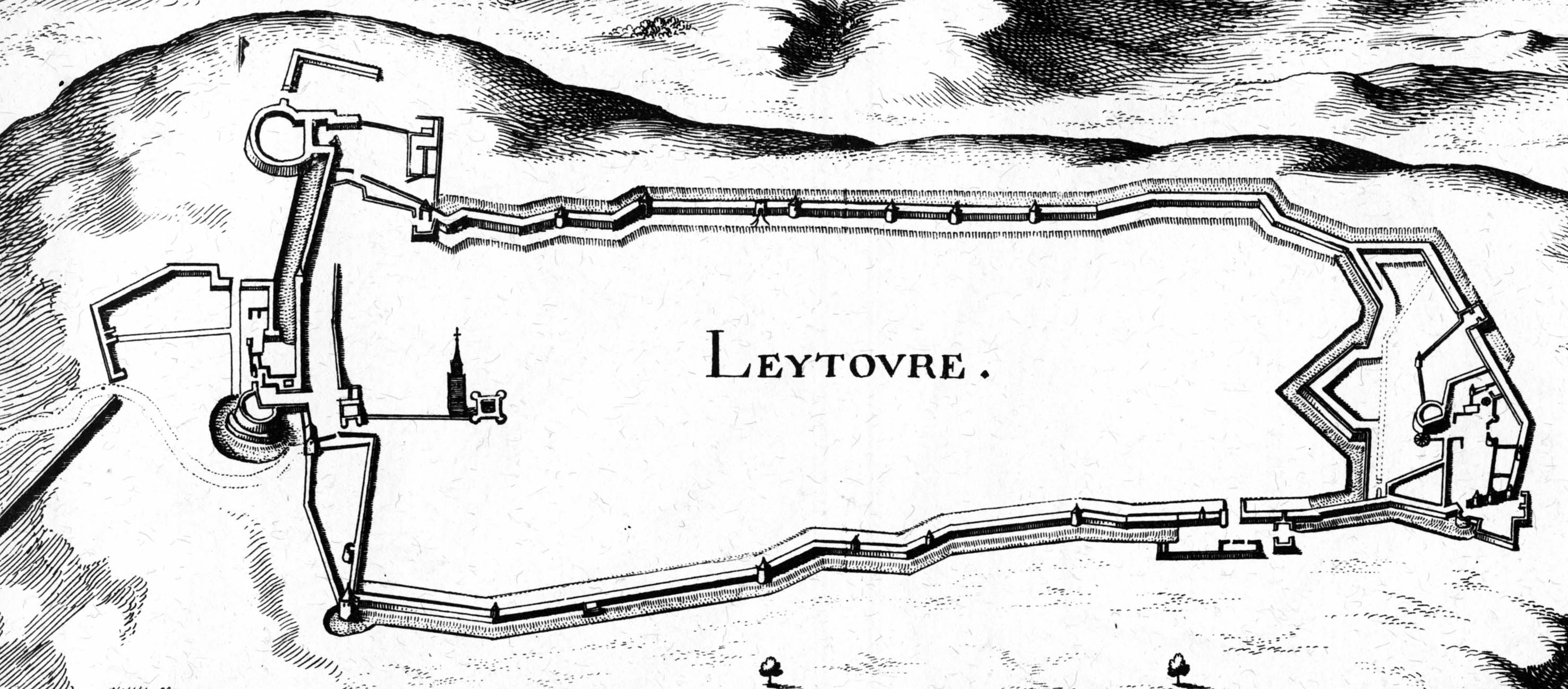 Plan des fortifications de la ville de Lectoure (Gers) édité par Mérian entre 1665 et 1661